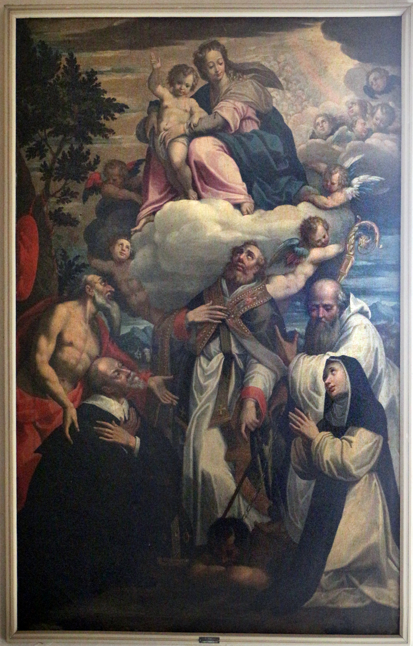 Palazzo Comunale This is a photo of a monument which is part of cultural heritage of Italy.